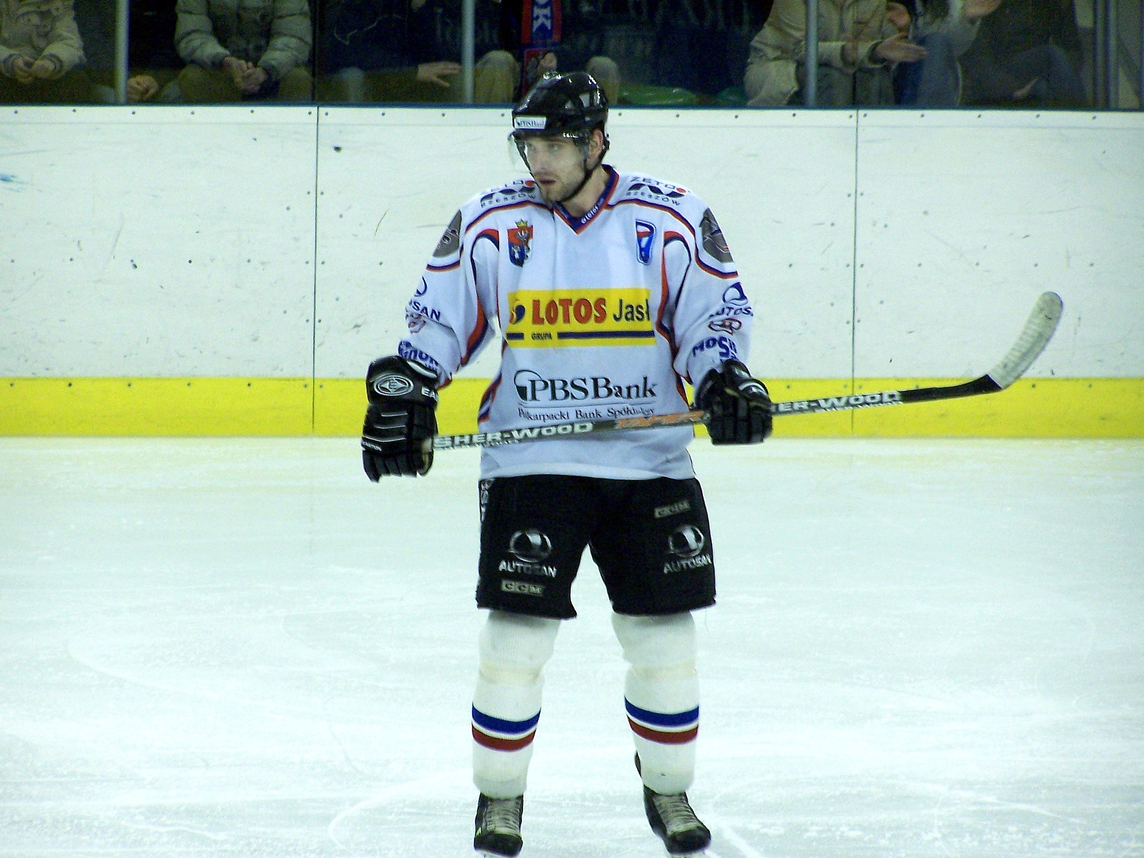 Miroslav Zaťko w barwach KH Sanok podczas meczu z Unią Oświęcim